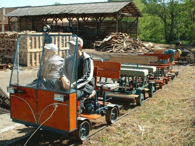 Amatőr építésű motoros hajtányok (Kaszói Állami Erdei Vasút)